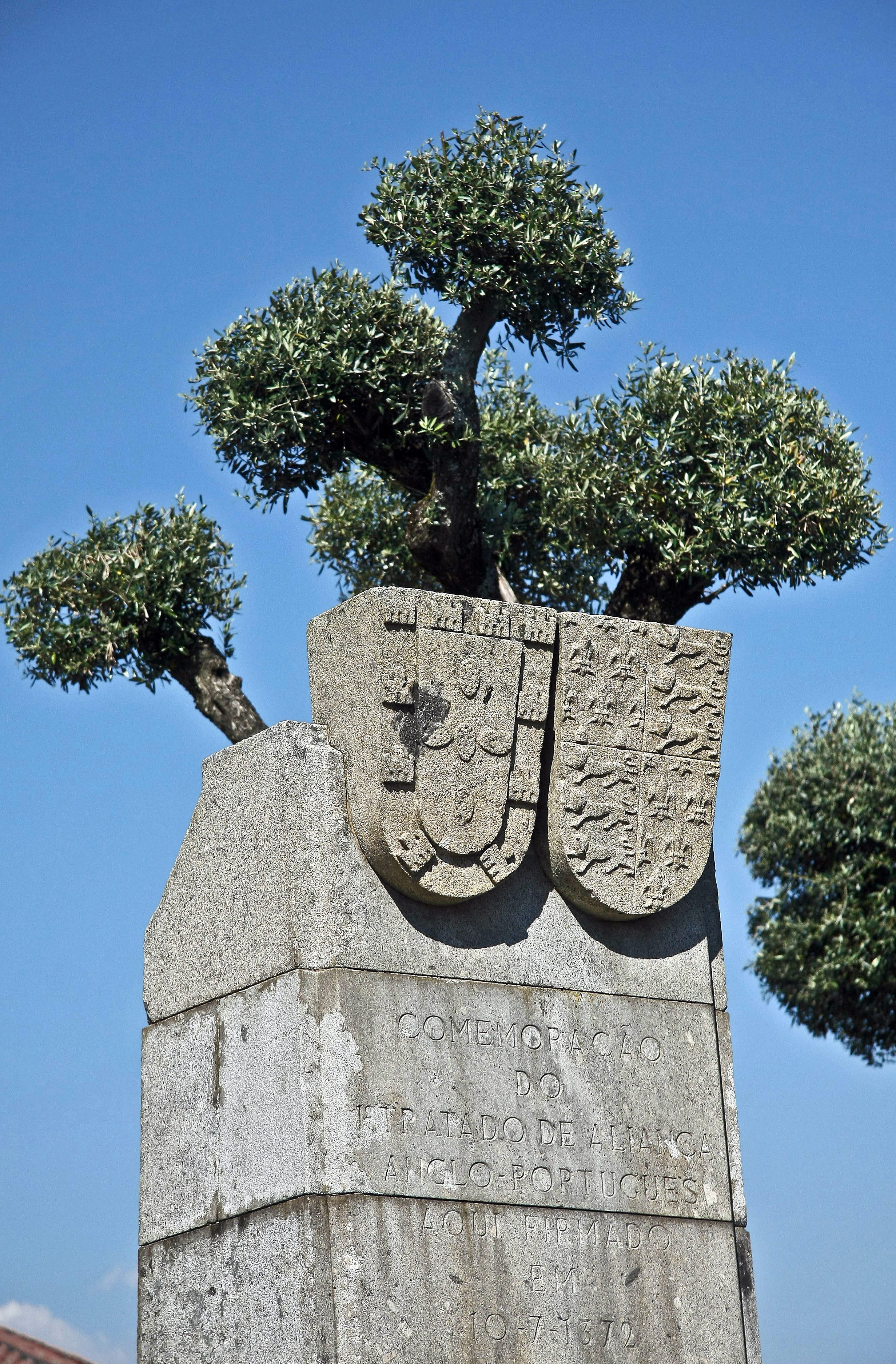 Este obelisco evocativo do Tratado de Tagilde, localizado na freguesia de Tagilde, simboliza a mais antiga aliança militar que perdura no mundo. Este importante tratado foi celebrado entre o rei português D. Fernando e o Duque de Lencastre, no ano de 1372.